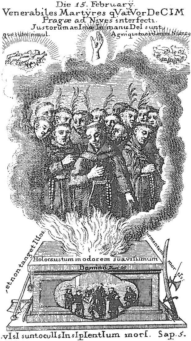 Čtrnáct pražských mučedníků